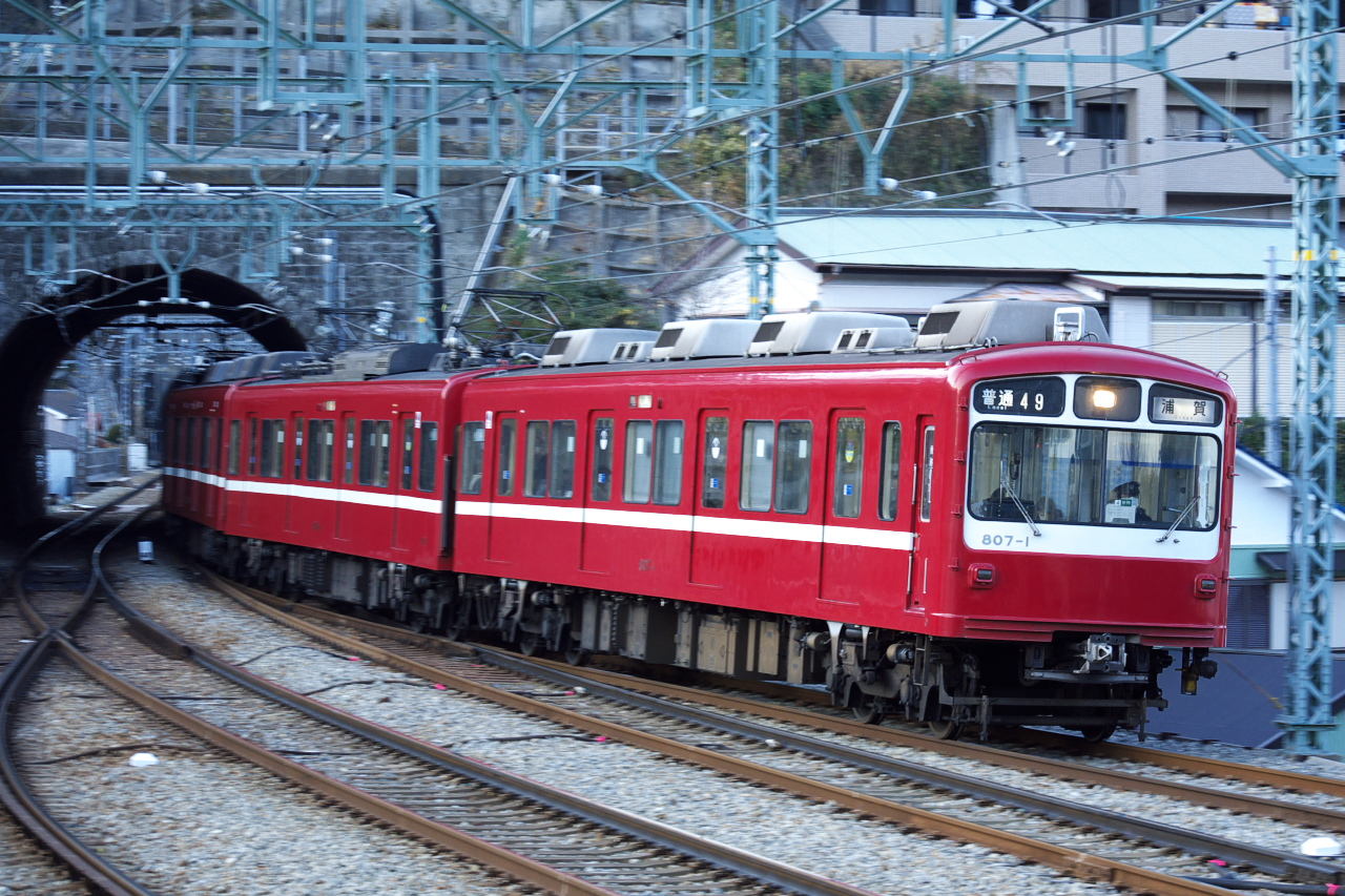 Nikon1 V1 + VR30-110mmにて撮影。逸見駅に到着する下り普通車浦賀行き800形です。